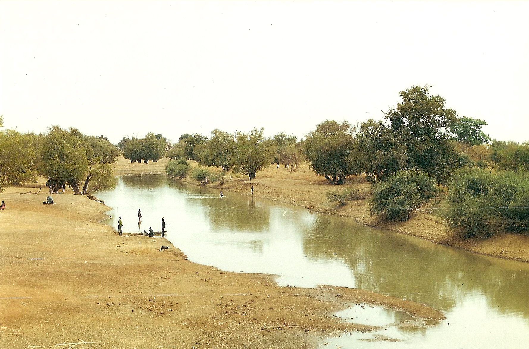 nakambe river, burkina faso